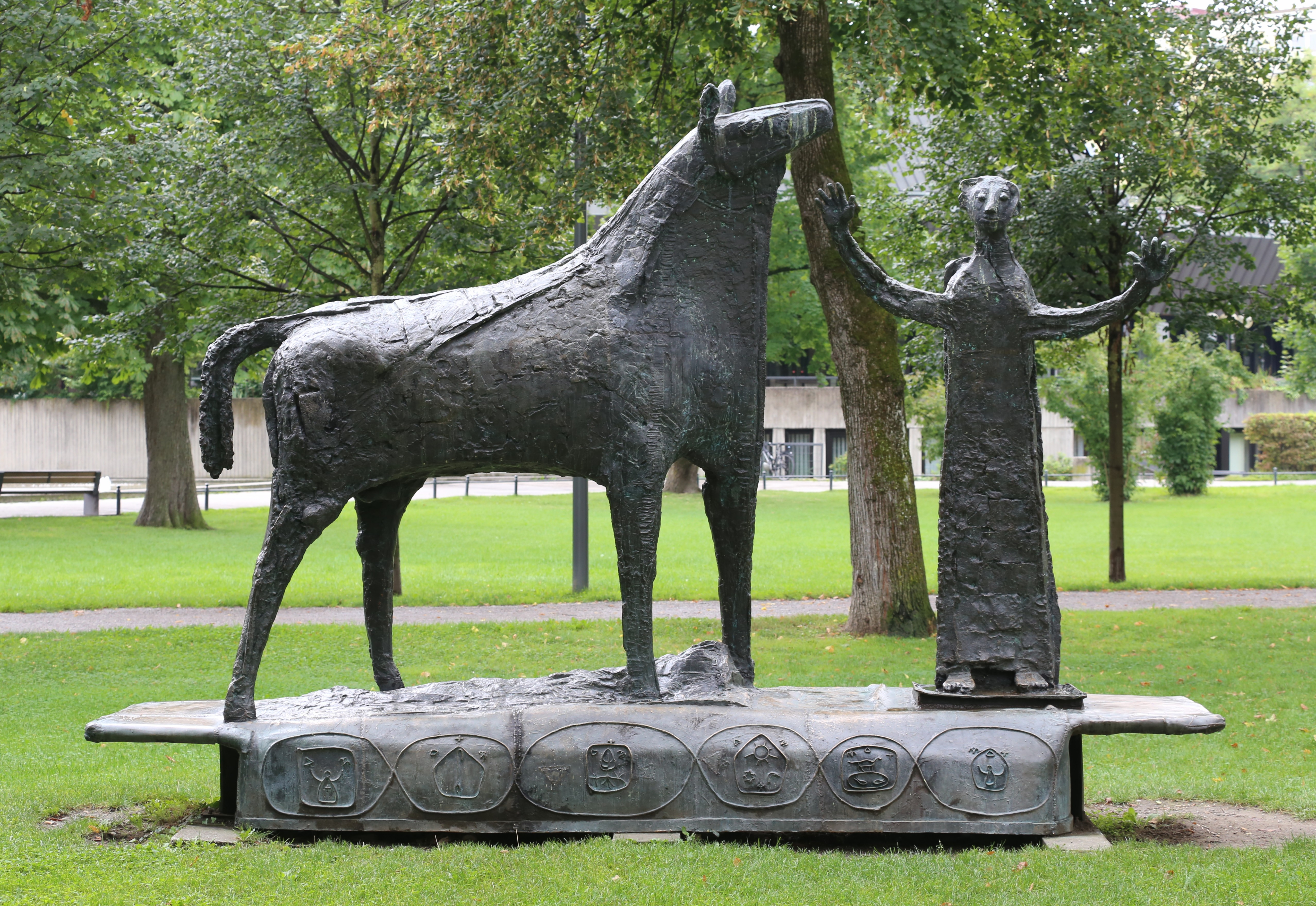 Heinrich Kirchner, Der 7. Schöpfungstag, 1963, Bronze; Salingarten, Rosenheim